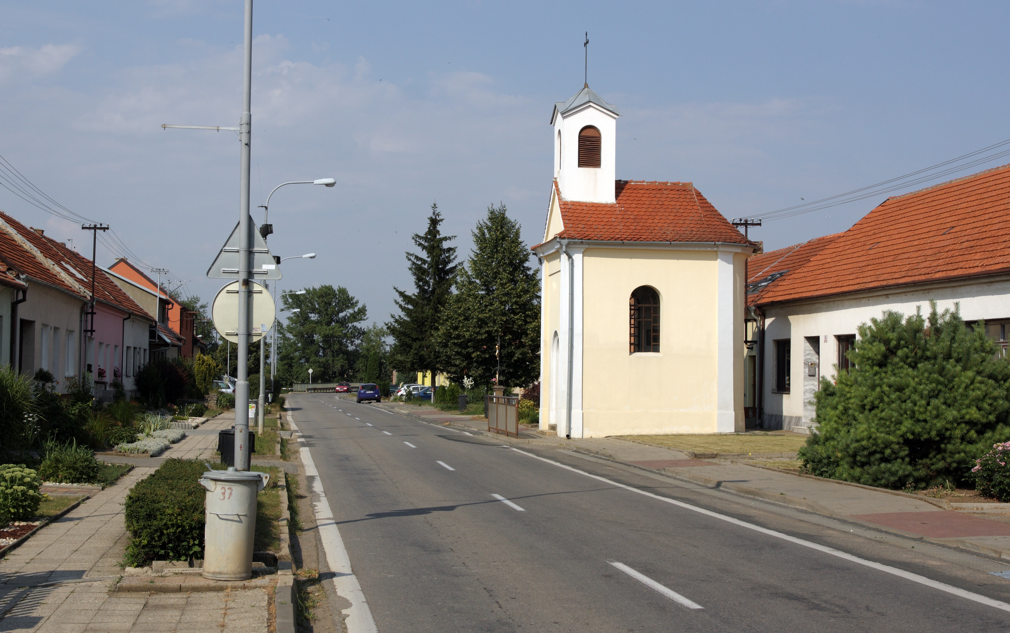 Dvorska - obecní kaple na ulici Zapletalova.